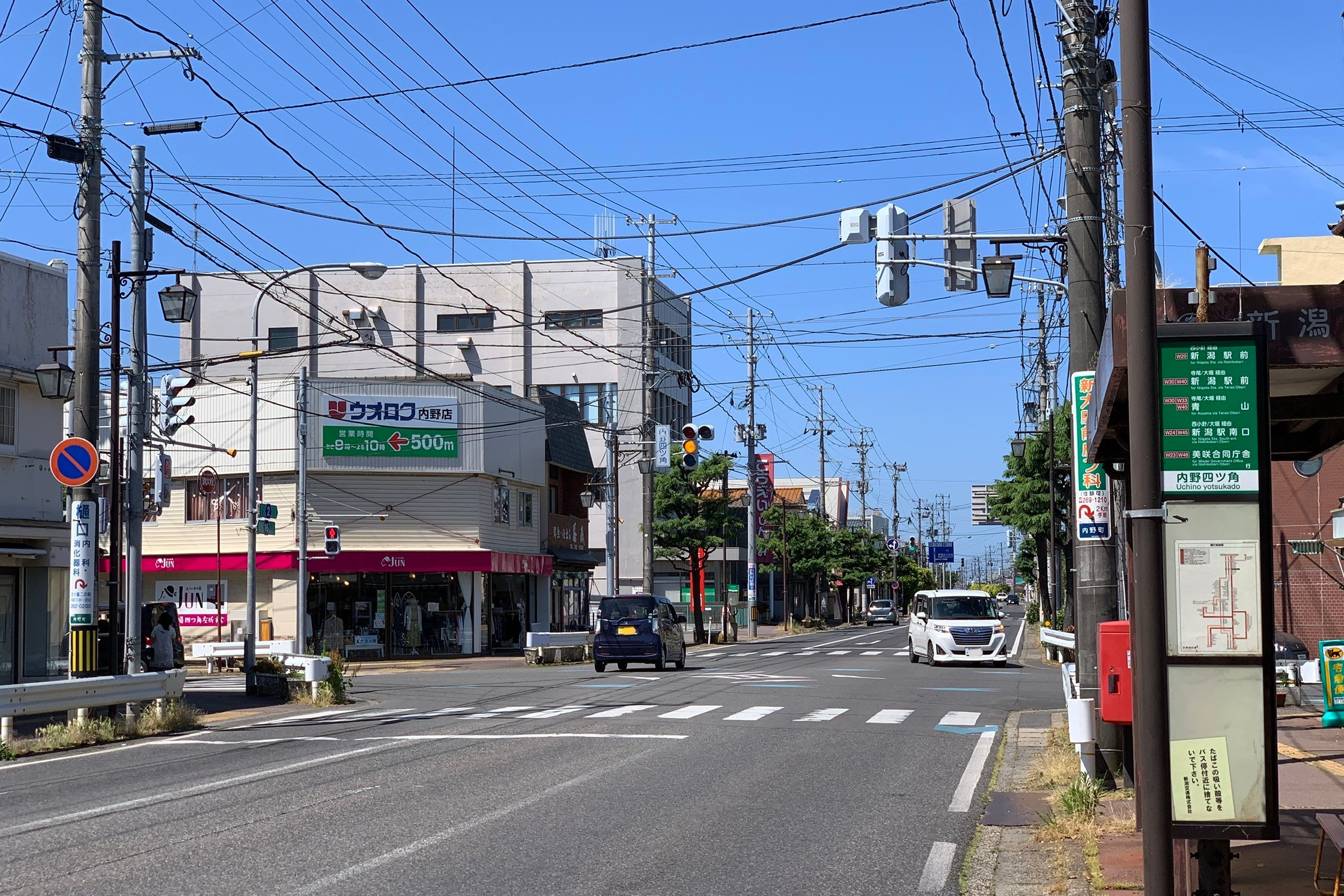 「内野四ツ角」交差点とバス停（新潟市西区，2020年6月）新潟県道2号新潟寺泊線・新潟県道16号新潟亀田内野線・新潟県道140号内野停車場線が交わる。